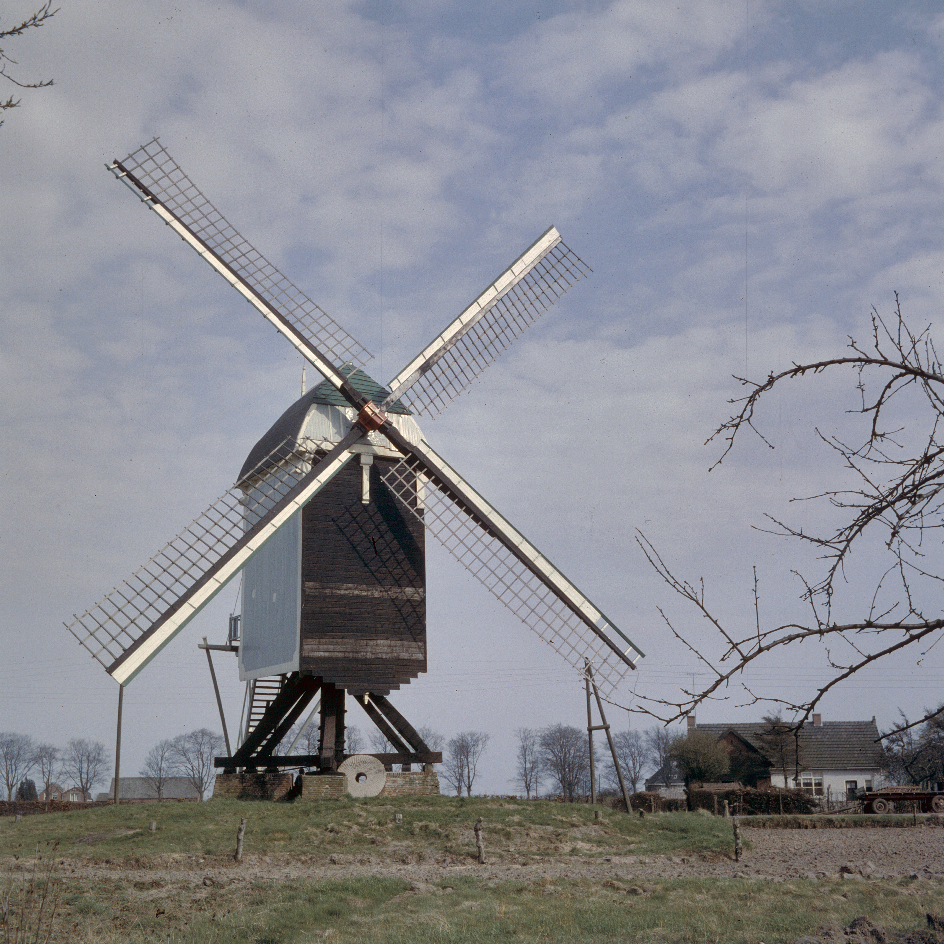 De Akkermolen: De Akkermolen te Zundert schuin van voren gefotografeerd (opmerking: Diacollectie Molens)